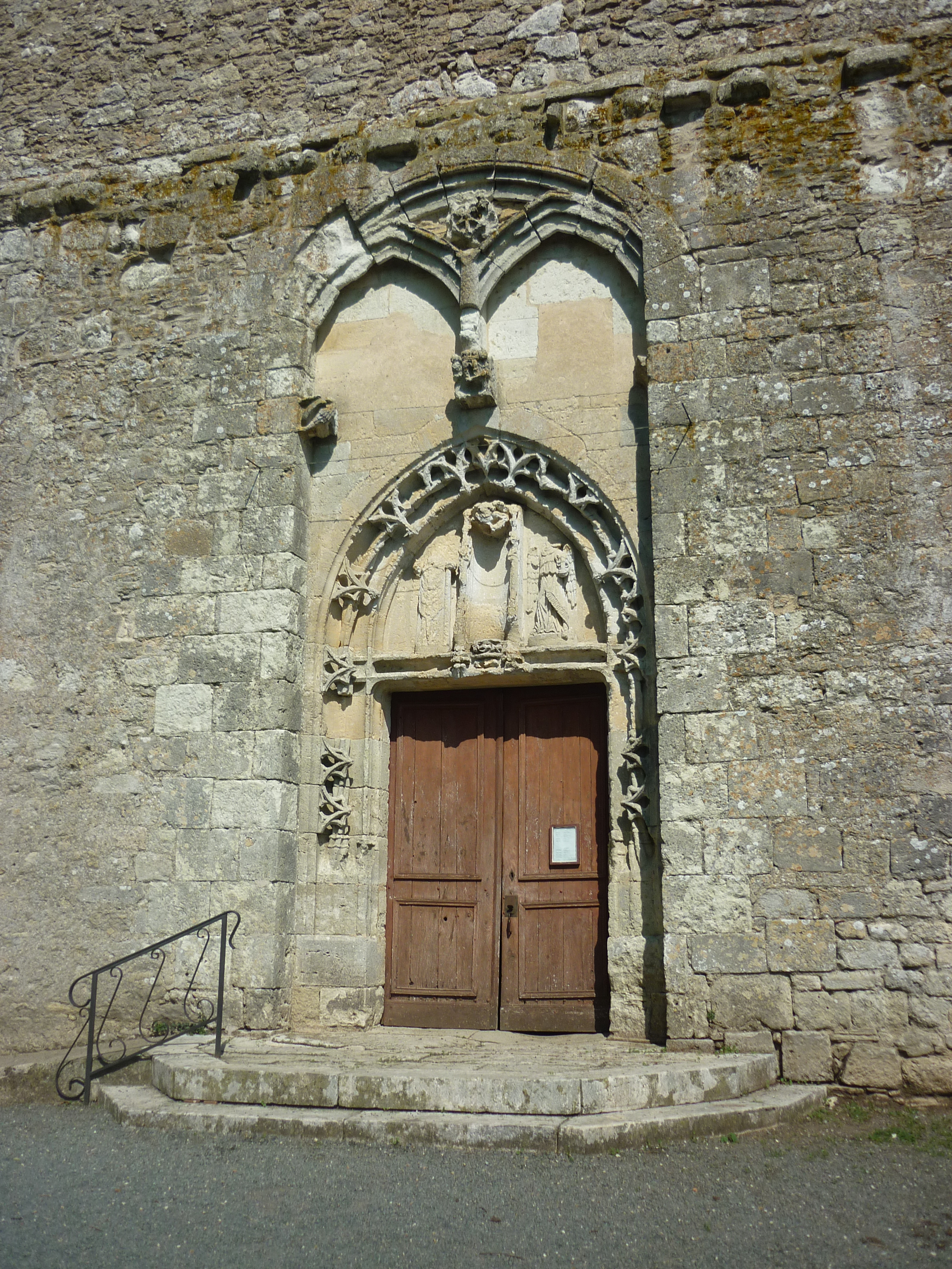 Porche de l'église de Saint-Méard-de-Gurçon (Dordogne).